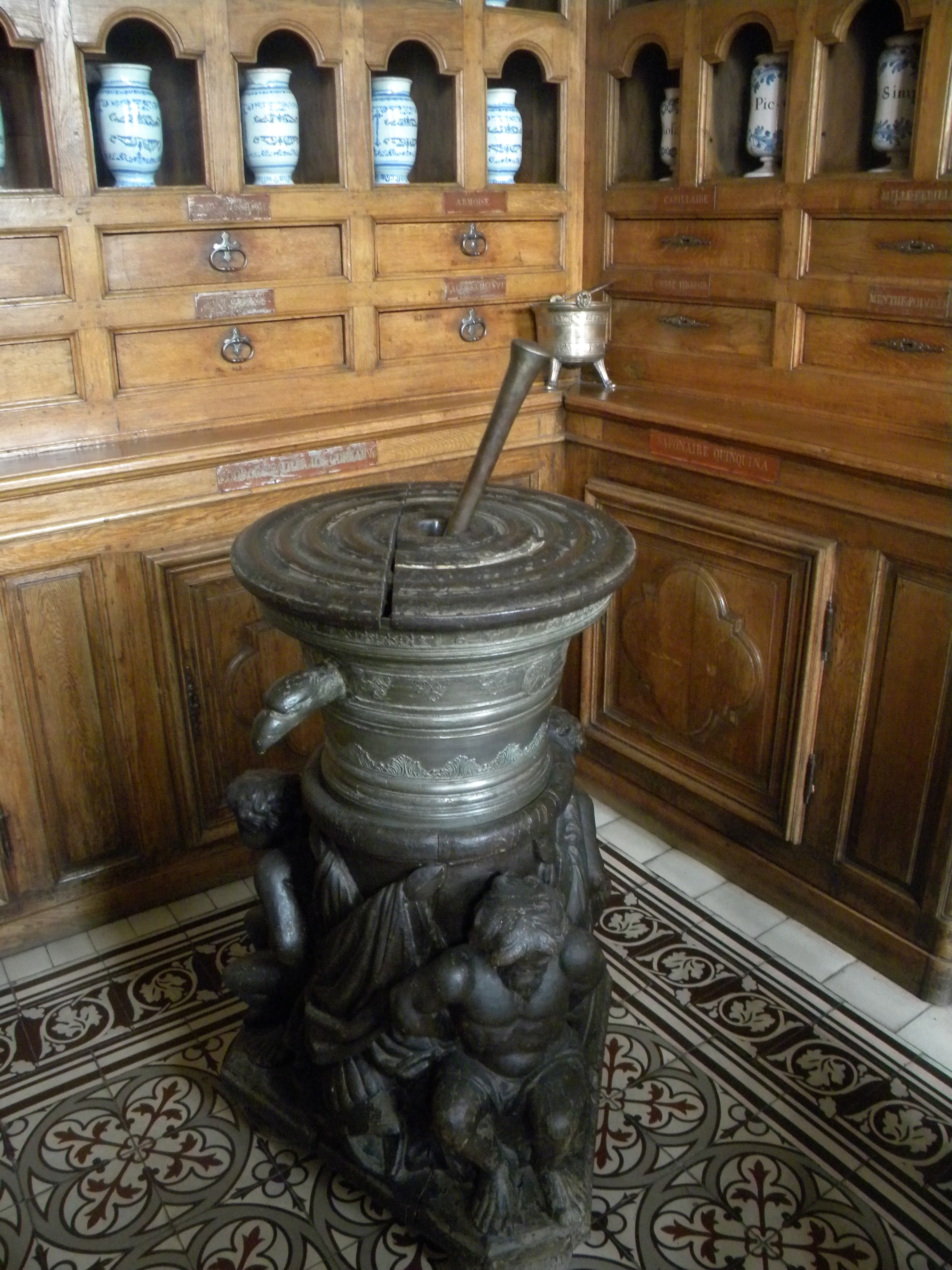 pistujo